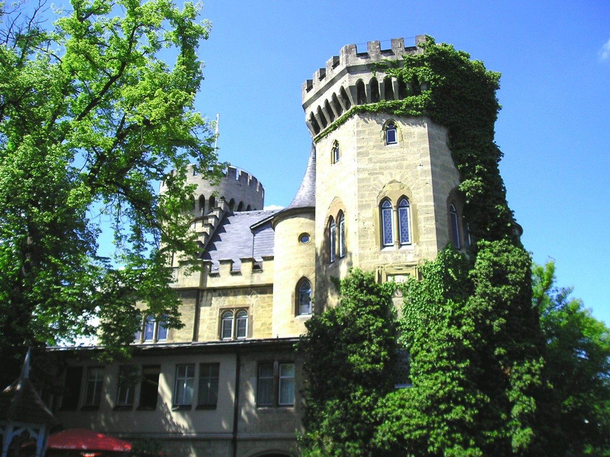 Castle Schloss Landsberg in Meiningen, Germany, built 1840.